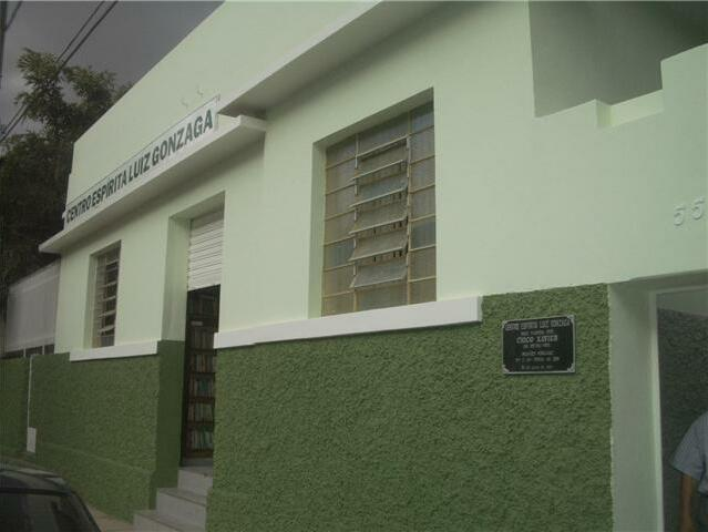 Centre spirite de Pedro Leopoldo, fondé par Chico Xavier